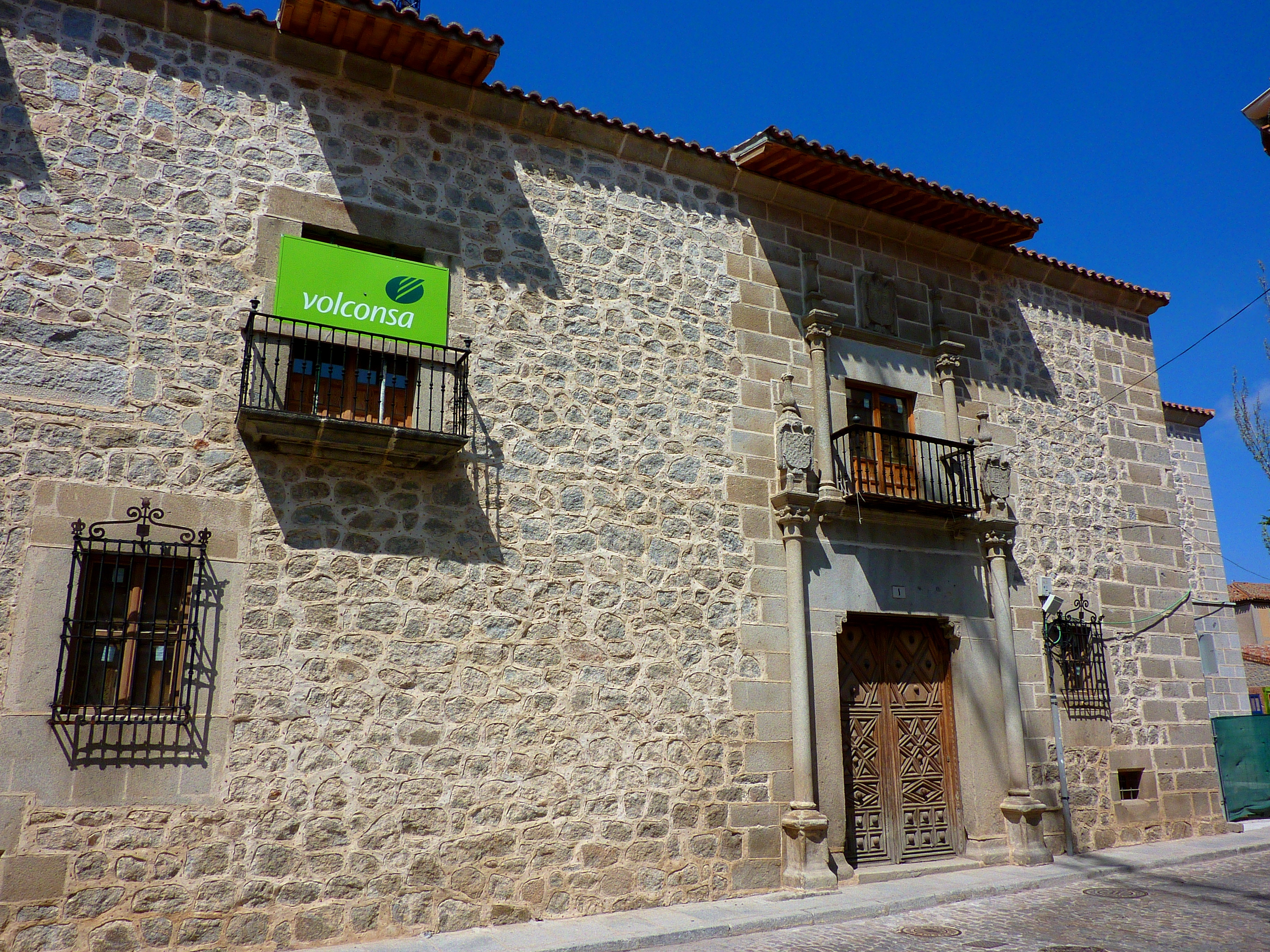 Casa de Miguel de Águila, o Mansión de los Águila (Ávila).